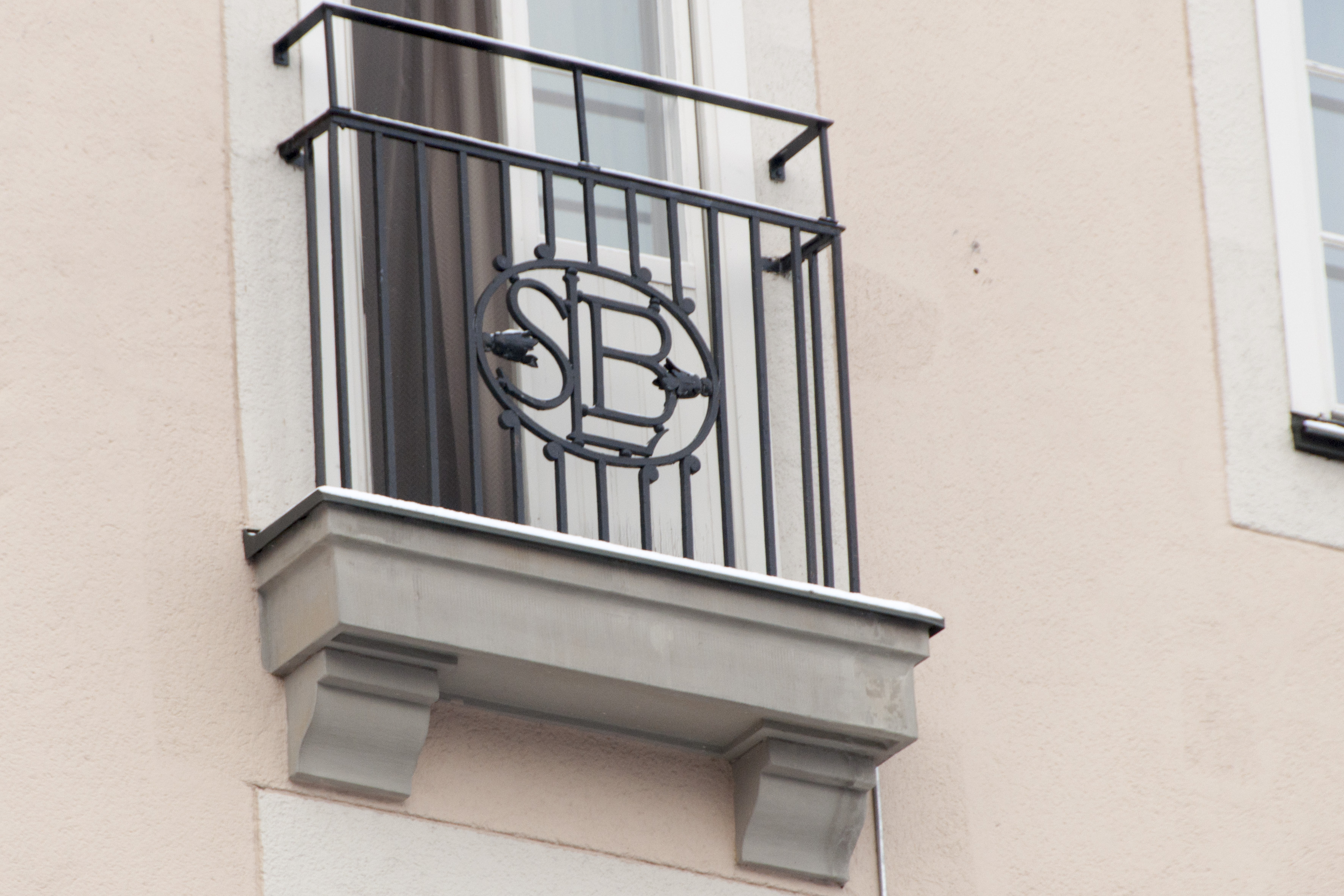 Monogram på balkong för Svenska Lantmännens Bank, monogram Skravelberget Mindre 9, Hamngatan 6, Norrmalmstorg 2